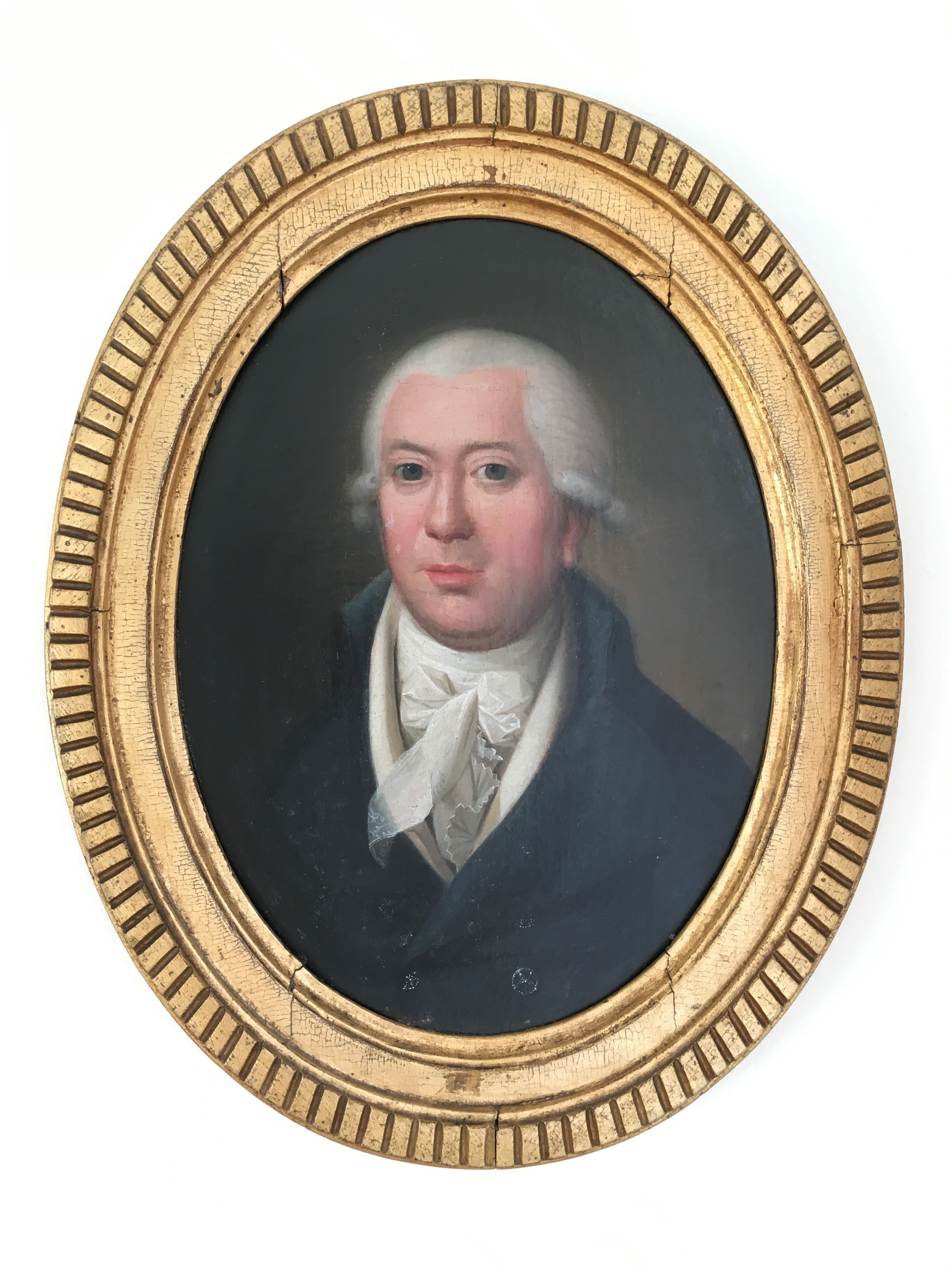 Portræt af Lauritz Nørregaard